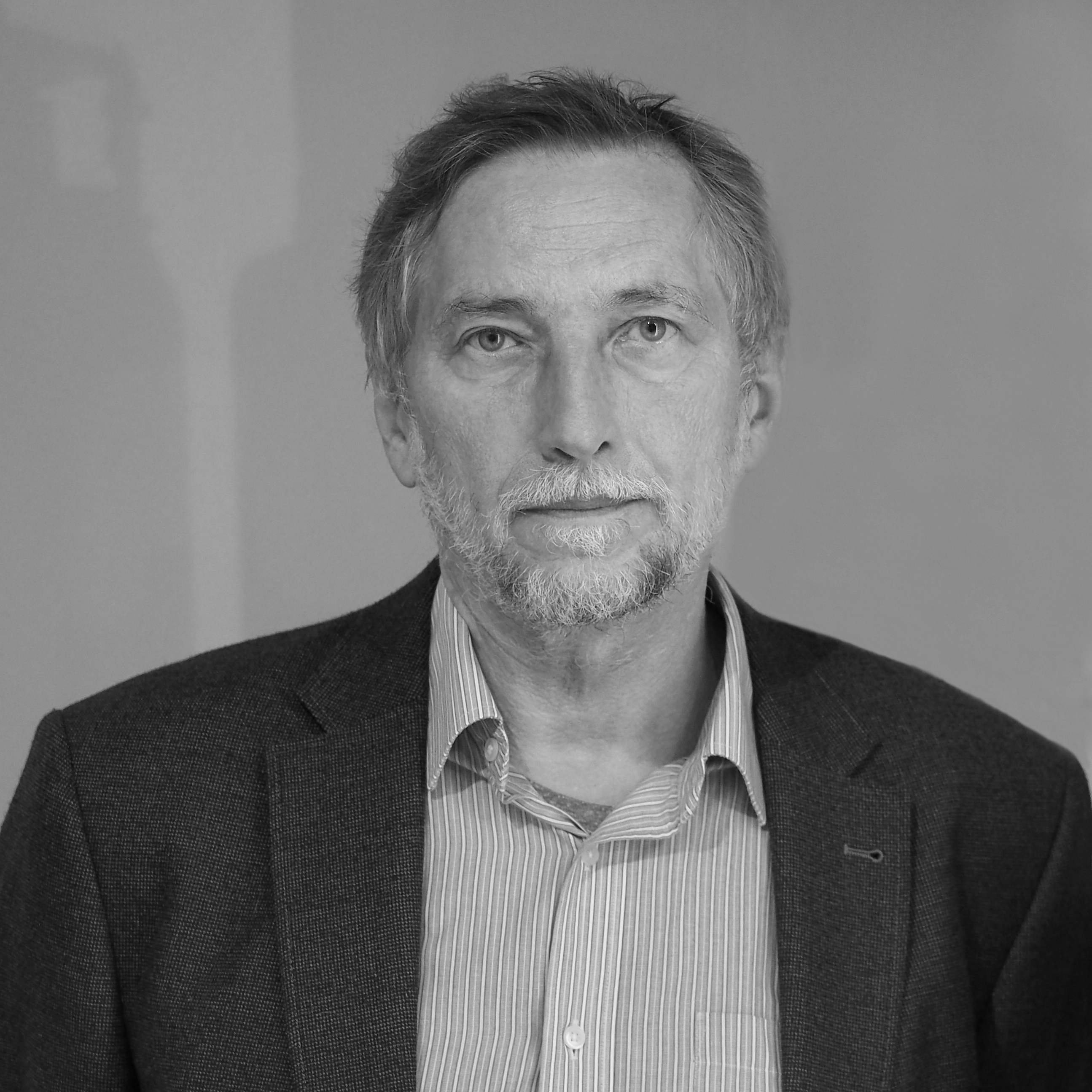 Selmeczi György belsőépítész, színházi díszlet- és látványtervező portréja. Budapest, a Pesti Vigadó földszinti kiállítótér, Magyar Belsőépítész Közhasznú Egyesület rendezvénye, 2019. október 8-án.